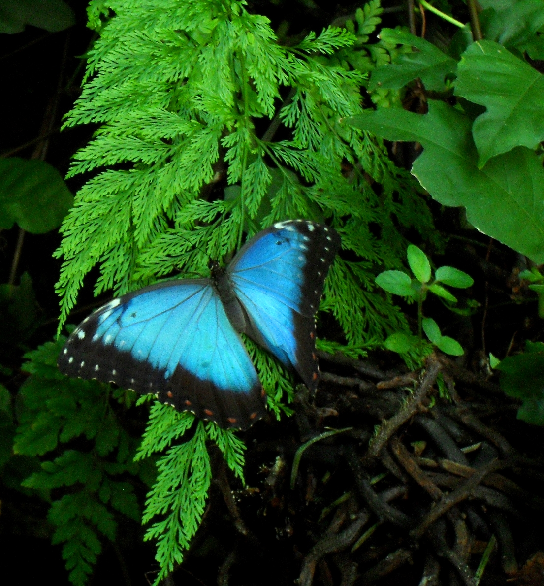 Morpho granadensis - Botanischer Garten Leipzig